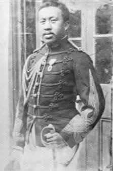 Philippe-Auguste Ramanankirahina (1860-1915): le premier malgache sorti de l'Ecole des Beaux-Arts de Paris.